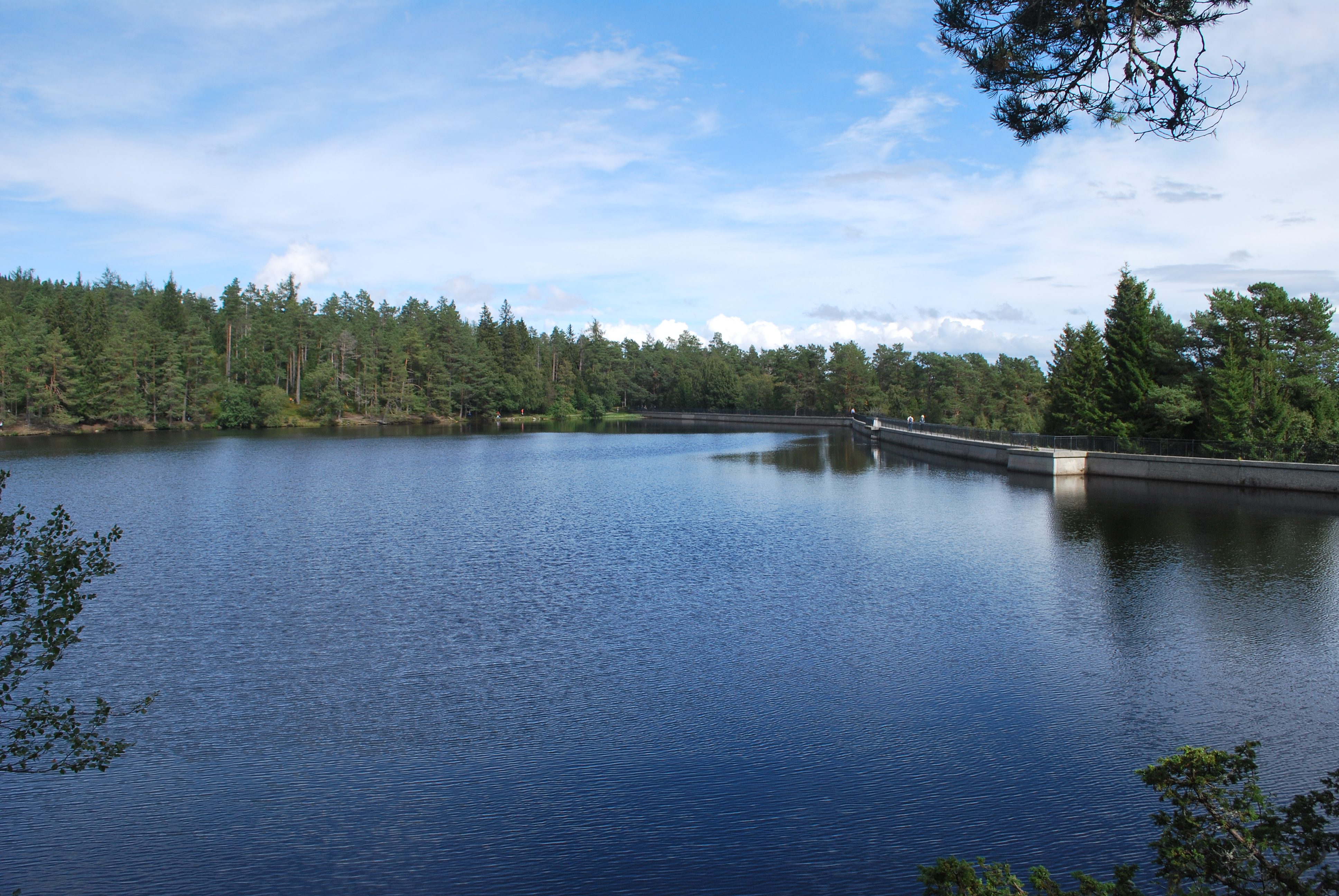 Baklidammen i Bymarka i Trondheim